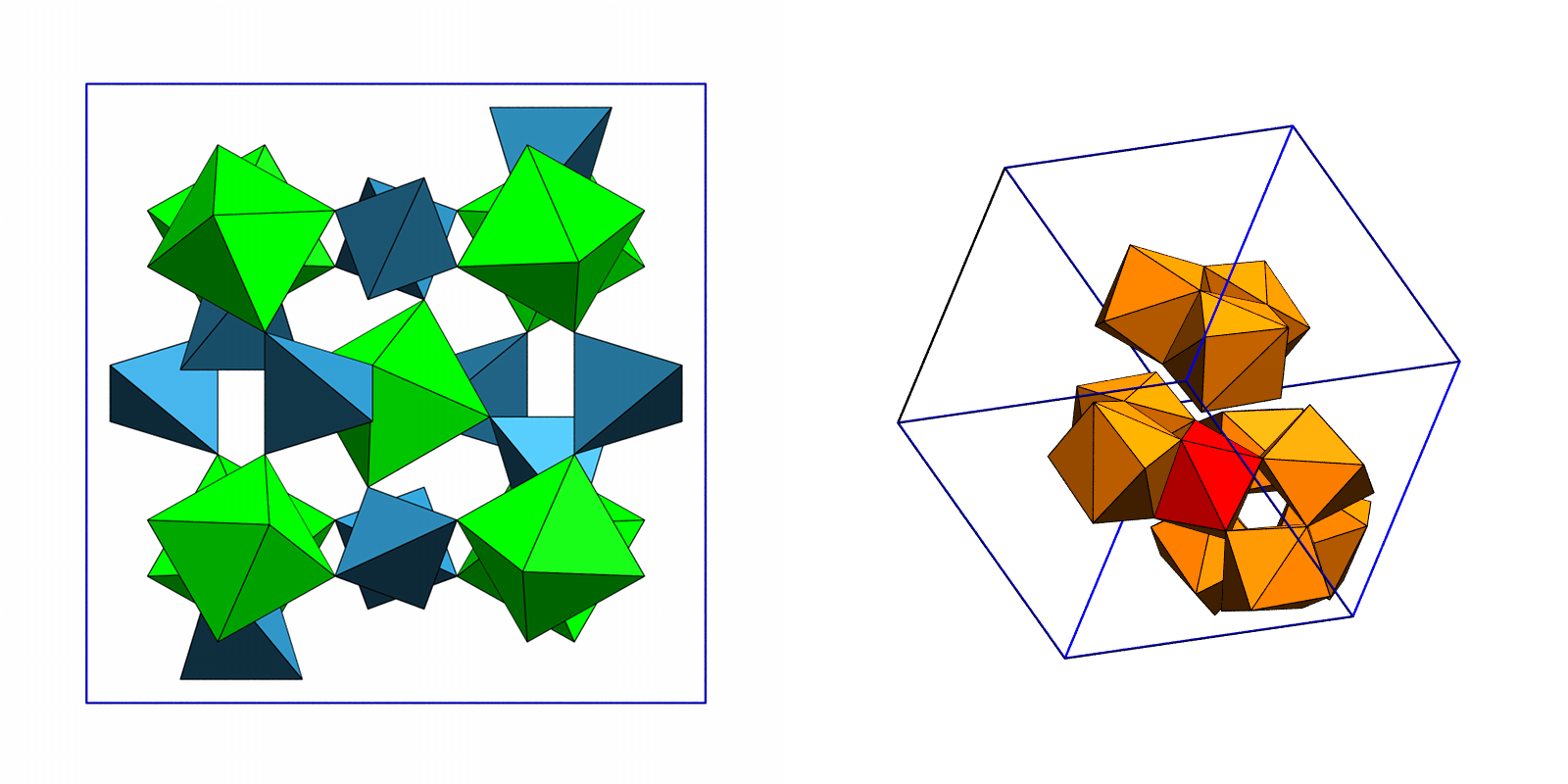 Granatstruktur: Verknüpdunge der Koordinationspolyeder basierend auf Strukturdaten von synthetischen Grossular bei Raumtemperatur